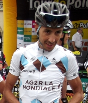 Matteo Montaguti lors du Tour de Pologne 2013